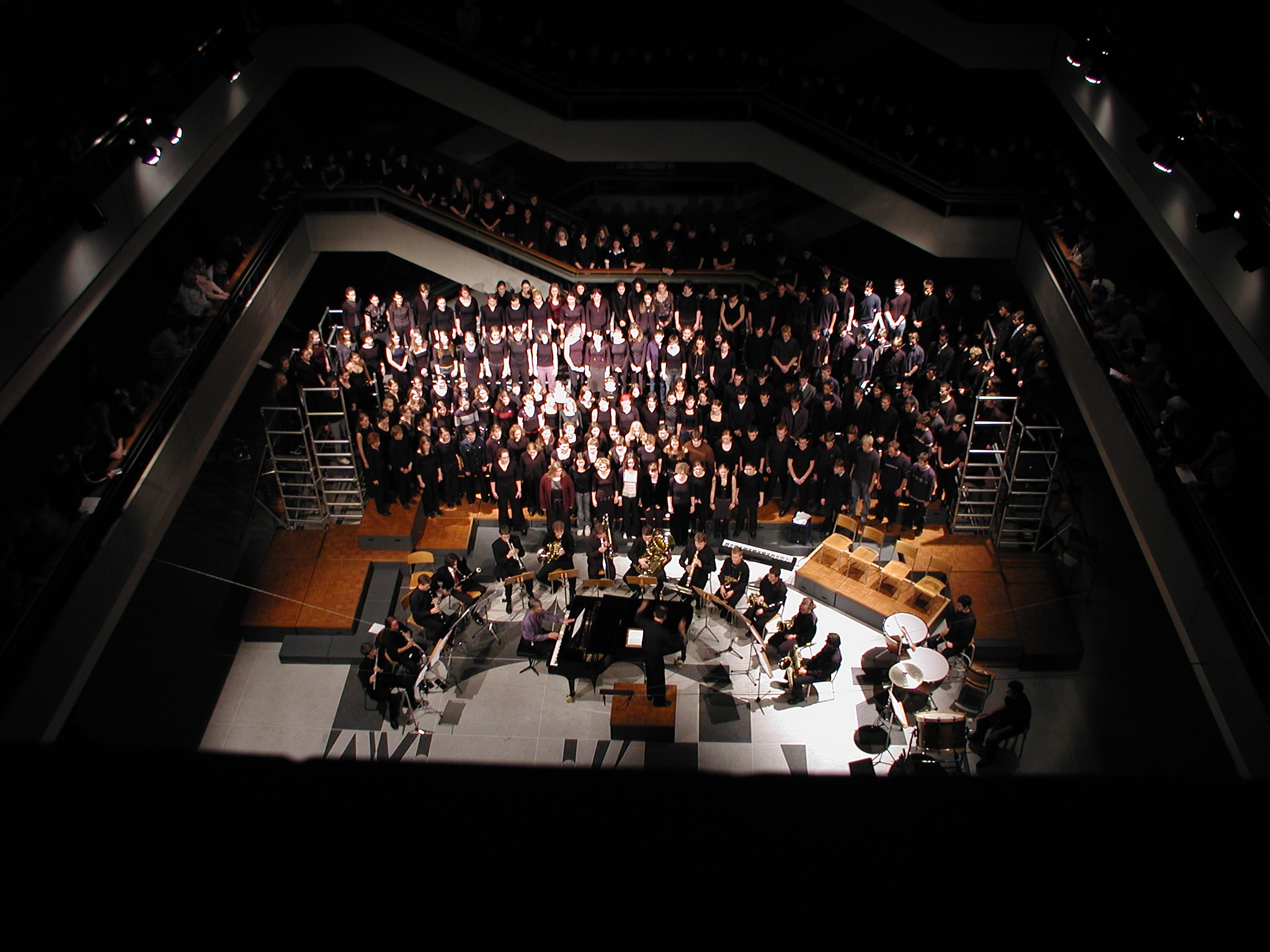 Konzert in der Galerie des Gymnasiums Neufeld